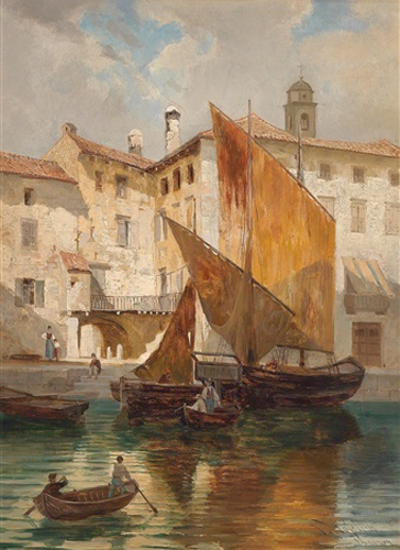 Hafen von Torbole am Gardasee